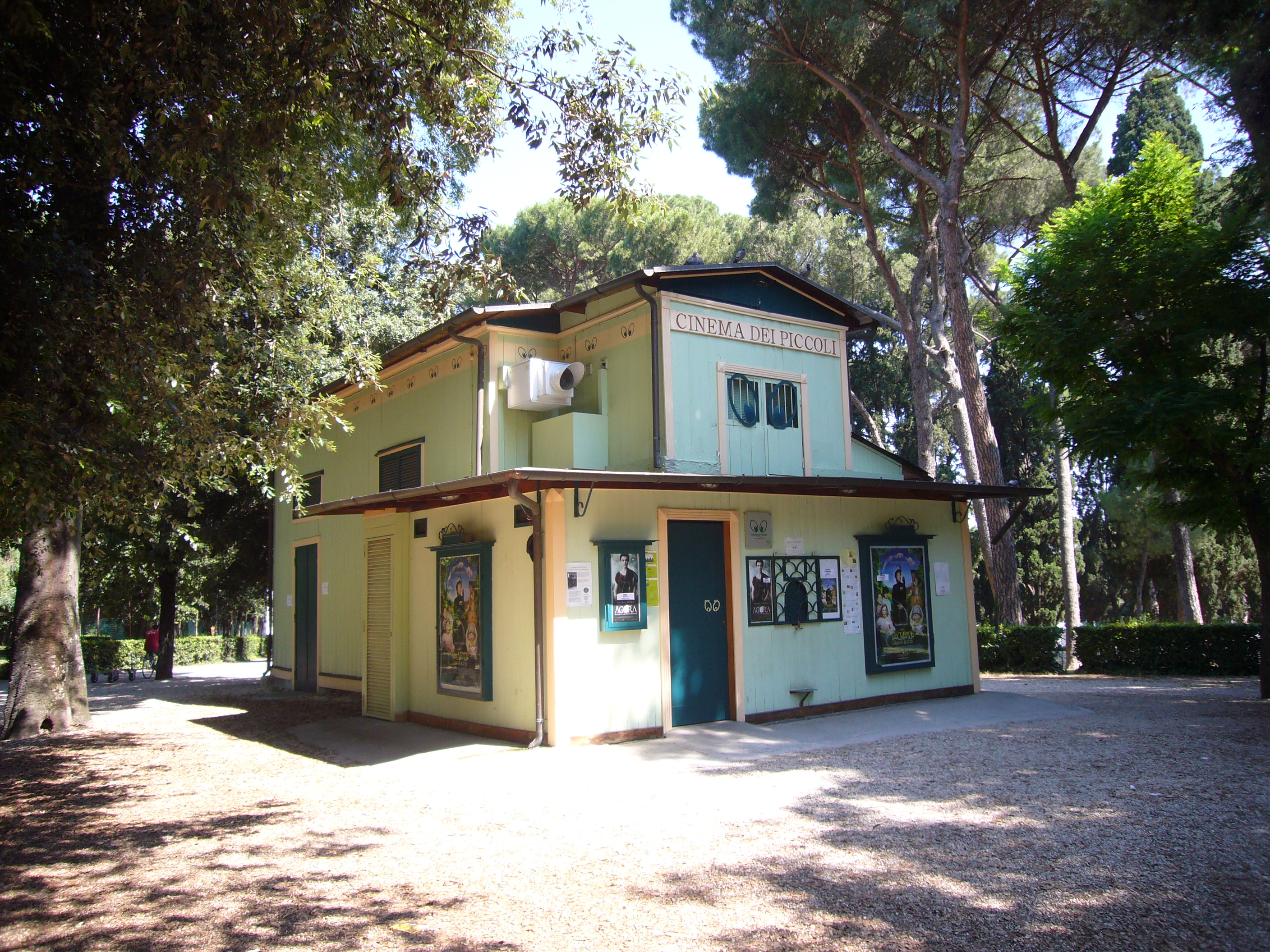 Roma, Villa Borghese: il Cinema dei Piccoli